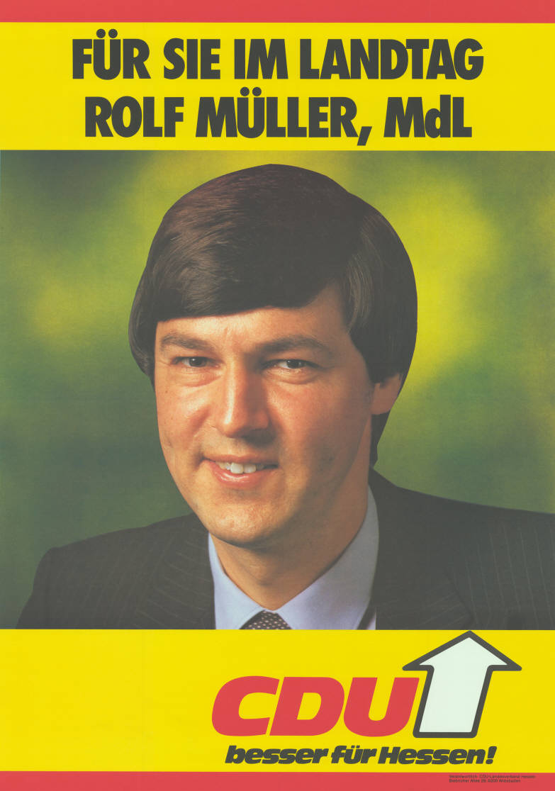 Für Sie im Landtag Porträtfoto Rolf Müller, MdL CDU besser für Hessen! Abbildung: Porträtfoto Plakatart: Kandidaten-/Personenplakat mit Porträt Auftraggeber: Verantw.: CDU-Landesverband Hessen, Wiesbaden Objekt-Signatur: 10-007 : 579 Bestand: Landtagswahlplakate Hessen (10-007) GliederungBestand10-18: Landtagswahlplakate Hessen (10-007) » CDU Lizenz: KAS/ACDP 10-007 : 579 CC-BY-SA 3.0 DE